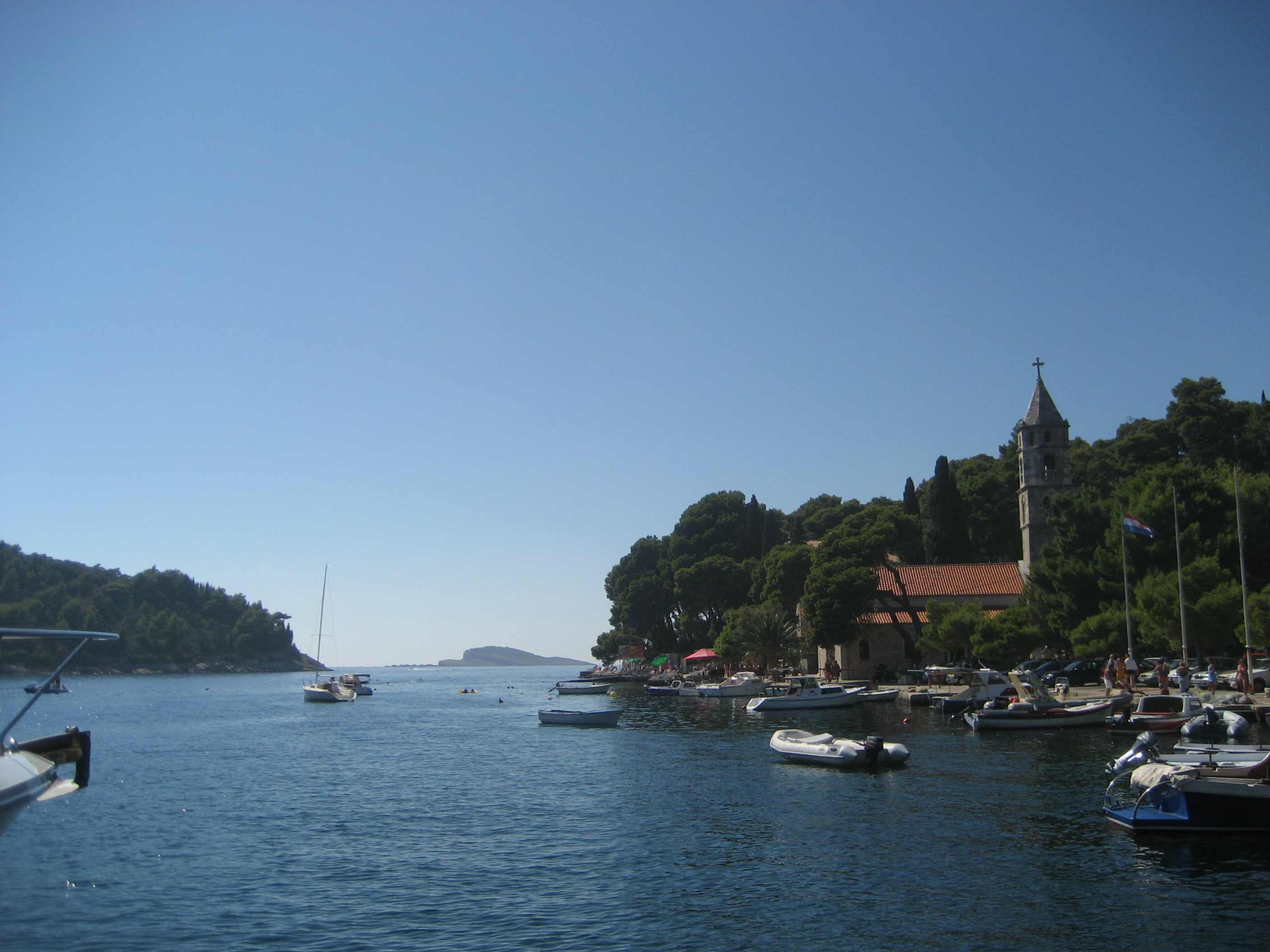 Cavtat, Croatia